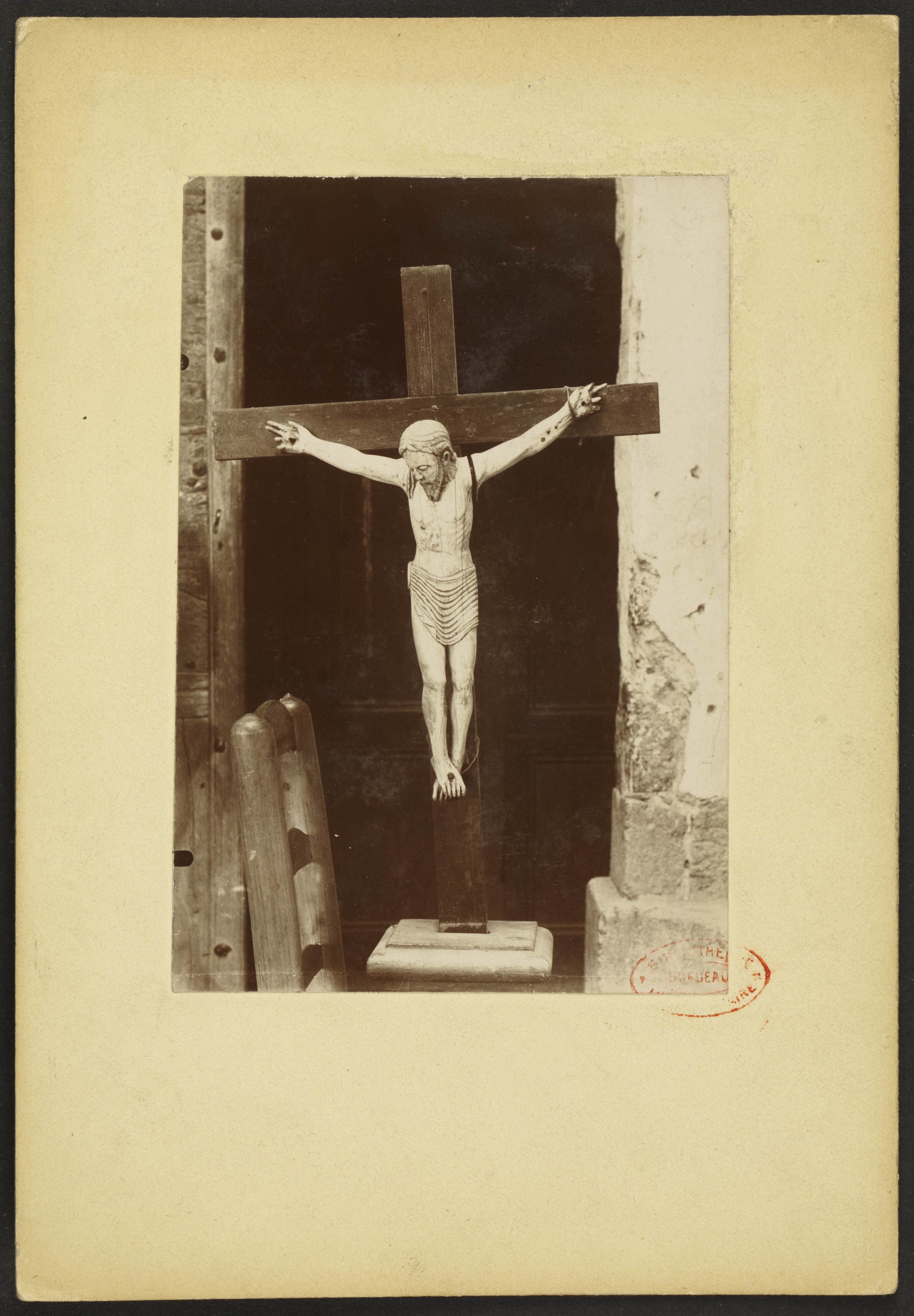 christ en croix dans l'Église Saint-Laurent d'Illats